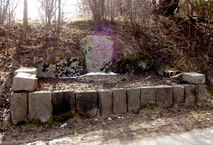 Monument hvor Tvenstrup Kirke stod indtil 1820